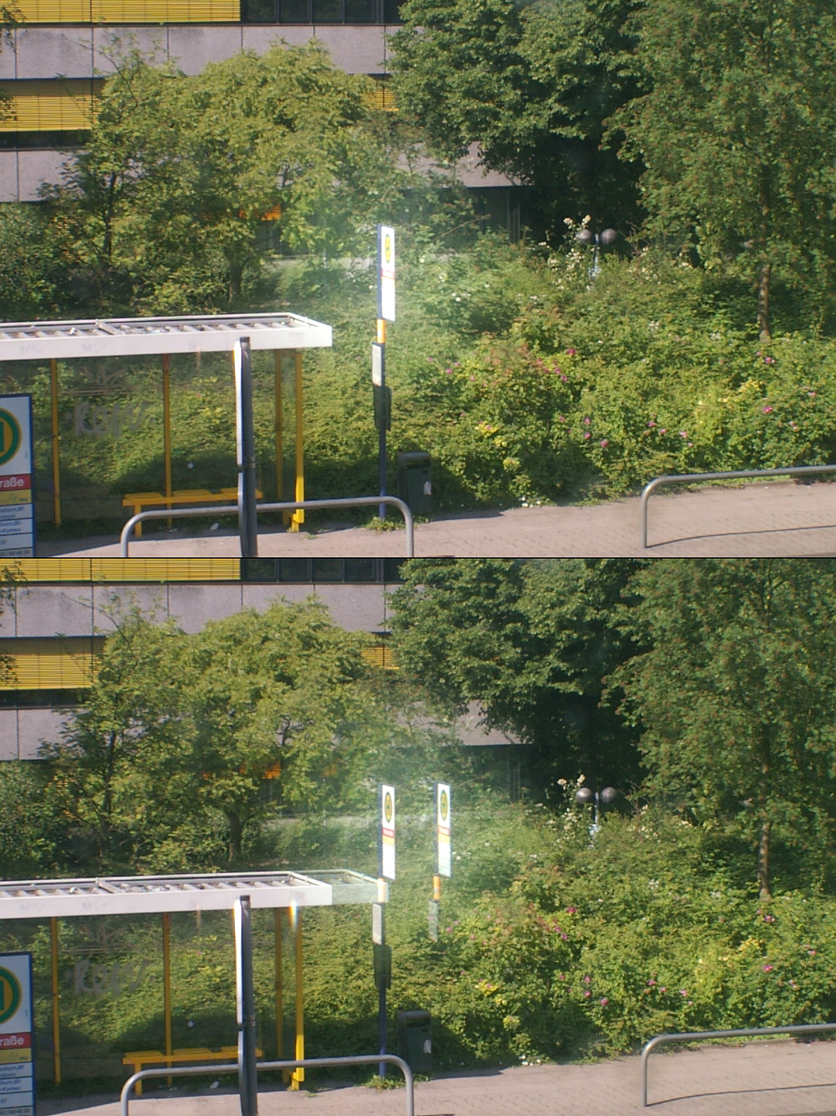 Ausschnitt aus dem Sucherbild einer Agfa Optima 1535. In der Bildmitte das etwas hellere Messfeld des Mischbildentfernungsmessers. In der oberen Bildhälfte ist das Objektiv auf "unendlich", unten auf etwa einen Meter Distanz scharfgestellt. Aufnahme mit Ricoh Caplio GX.